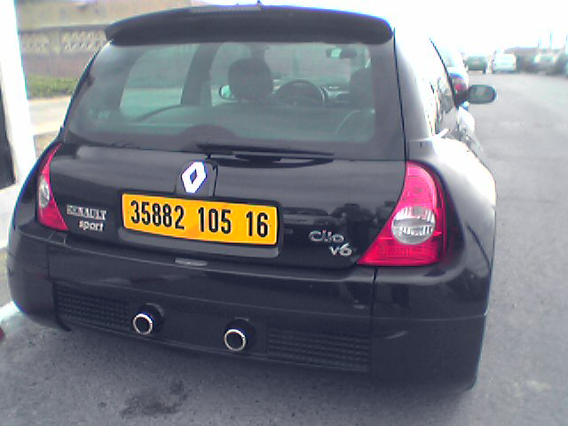 Renault clio V6